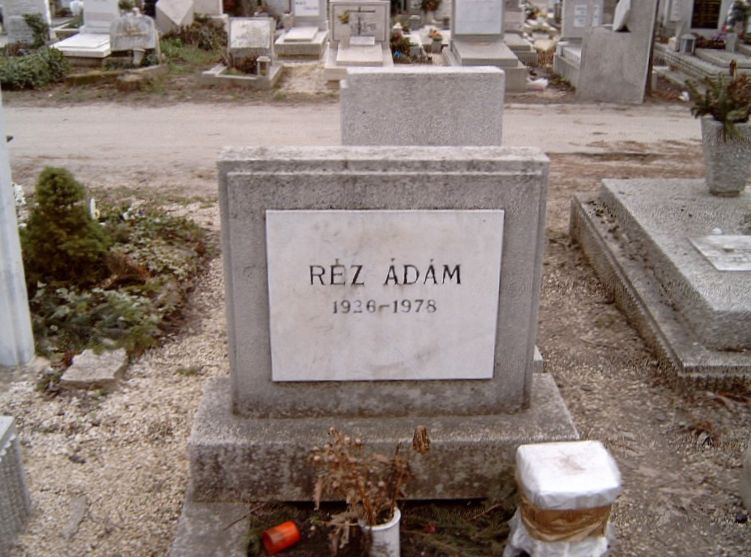 Réz Ádám (Arad, 1926. június 4. – Budapest, 1978. szeptember 13.) műfordító, kritikus, publicista sírja Budapesten. Farkasréti temető: 25-1-64